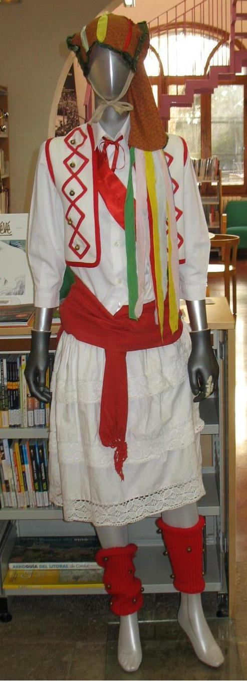 Mostra la indumentaria típica que porten els que interpreten el Ball dels Garrofins